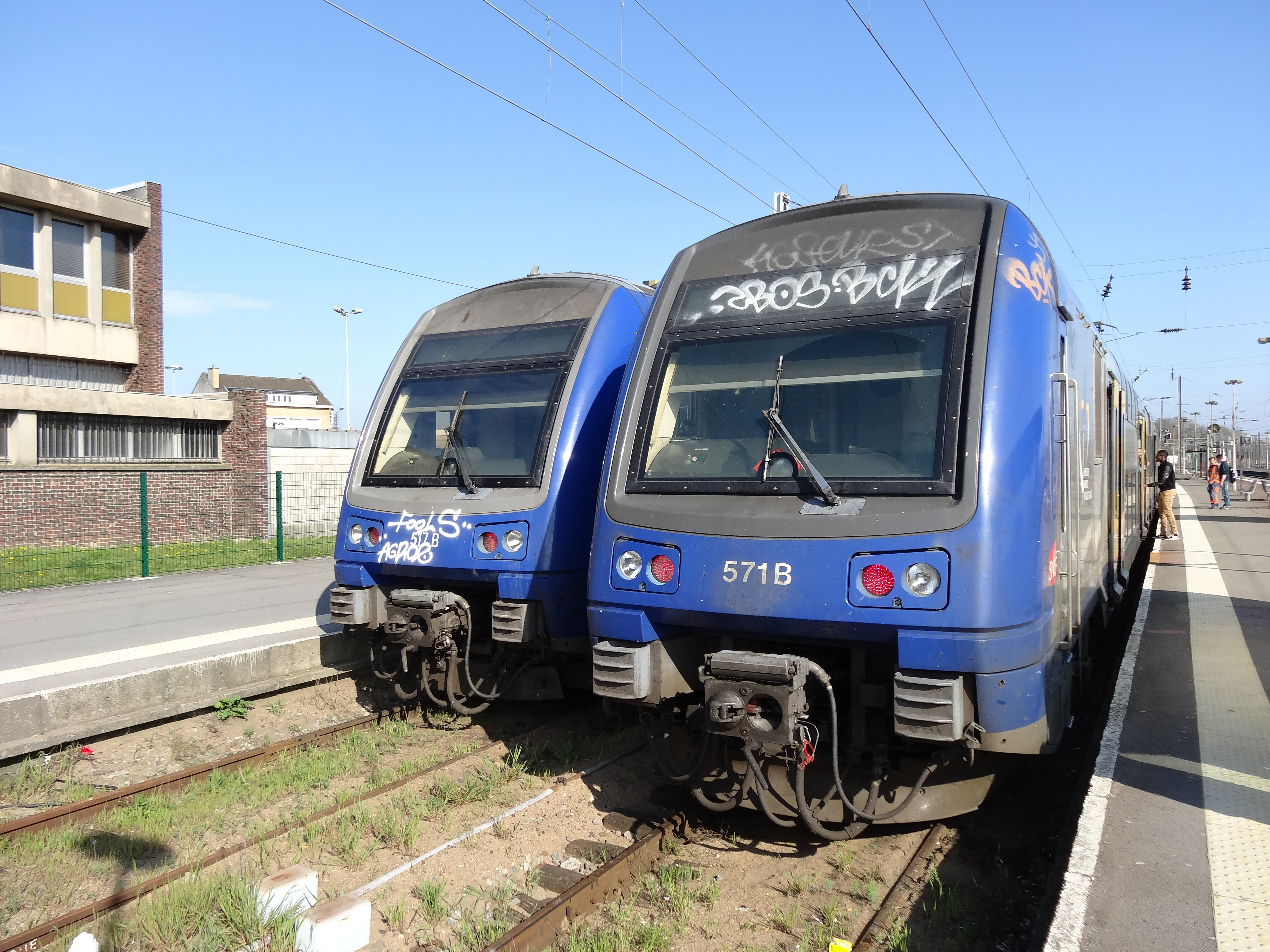 Gare de Lens, Pas-de-Calais, Nord-Pas-de-Calais, France. Z 23500 du TER Nord-Pas-de-Calais.